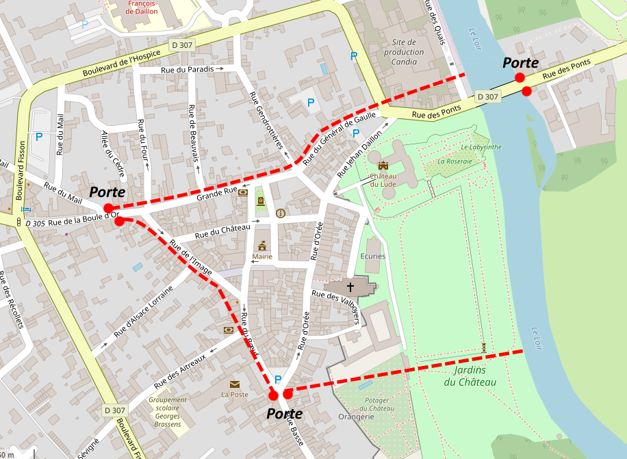 Carte des limites de la ville du Lude au Moyen Âge d'après les travaux de Jacques Bellanger. Le fond de carte OpenStreetMap présente les rues actuelles. This map may be incomplete, and may contain errors. Don't rely solely on it for navigation.